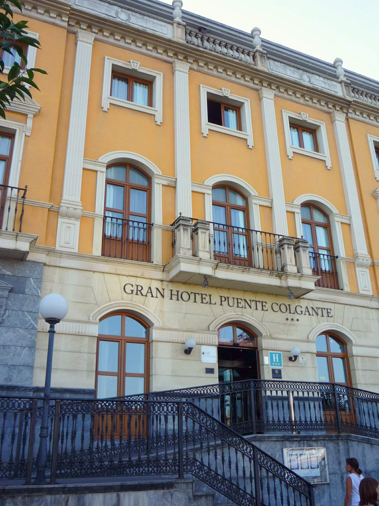 Gran Hotel Puente Colgante (Portugalete)